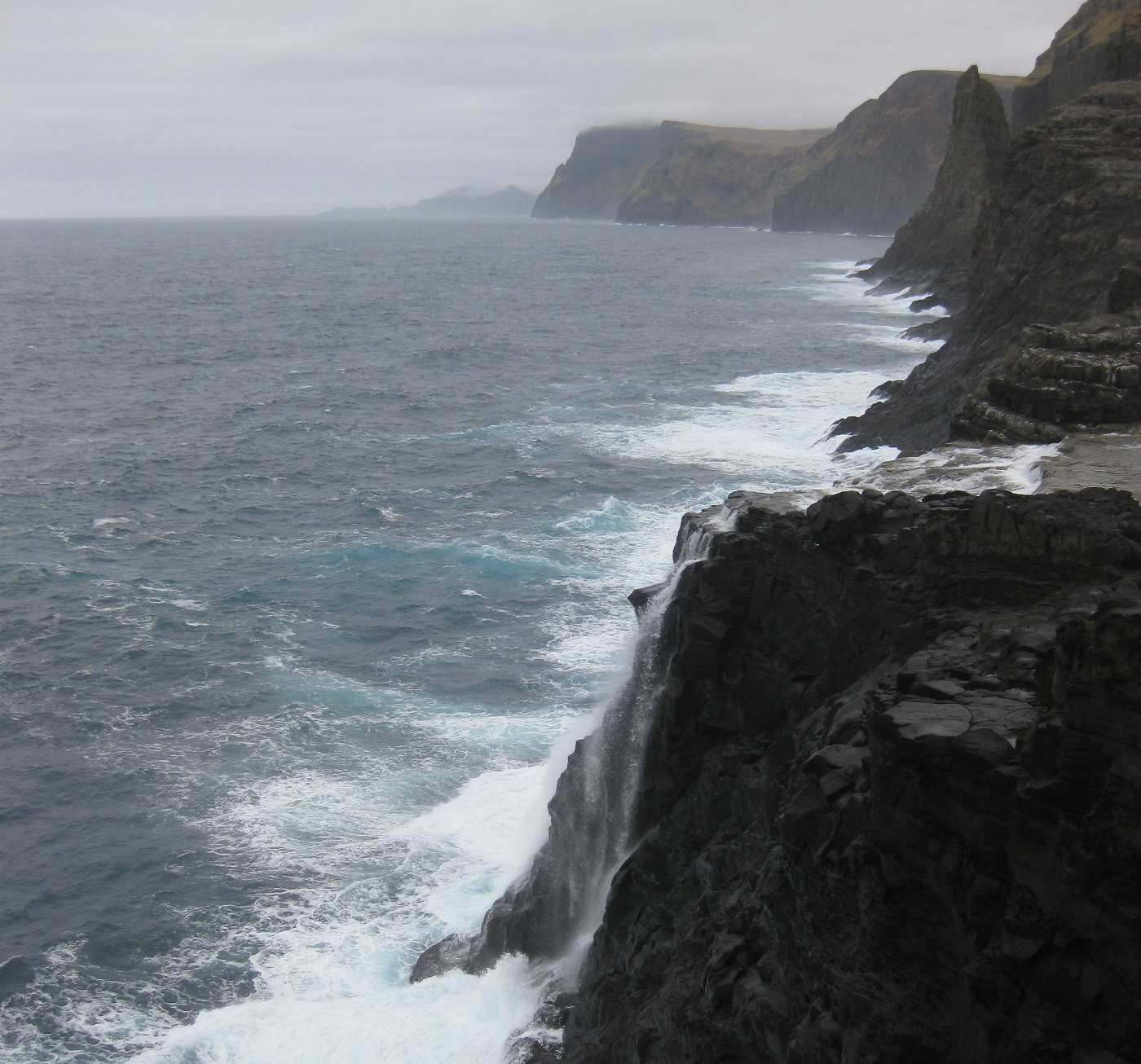 Der Bøsdalafossur Wasserfall fließt vom größten See der Färöer Inseln Sørvágsvatn in den Nordatlantik